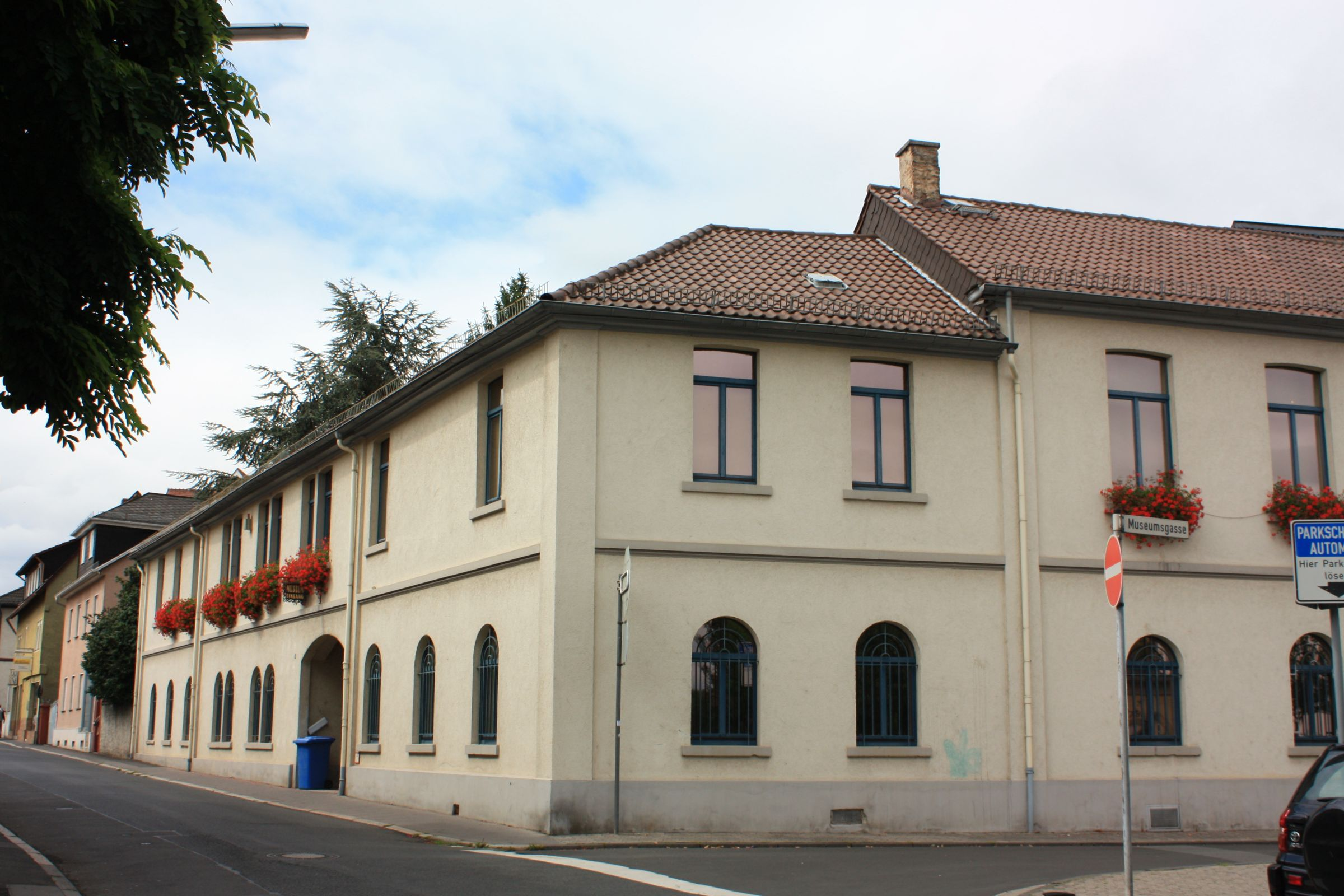 Wetterau-Museum in Friedberg, Hessen, Deutschland